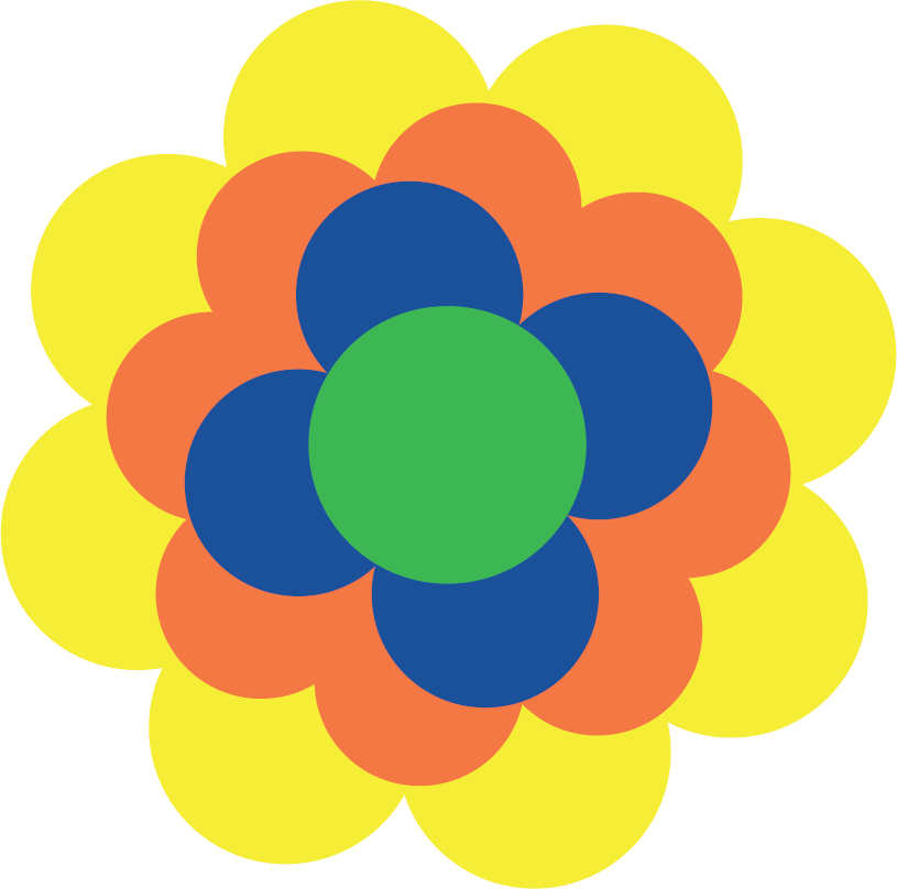 Prilblume. Es gab sie in den 70ern als Abziehbild mit dem Geschirspülmittel Pril und wurde so in viele Küchen verbreitet.